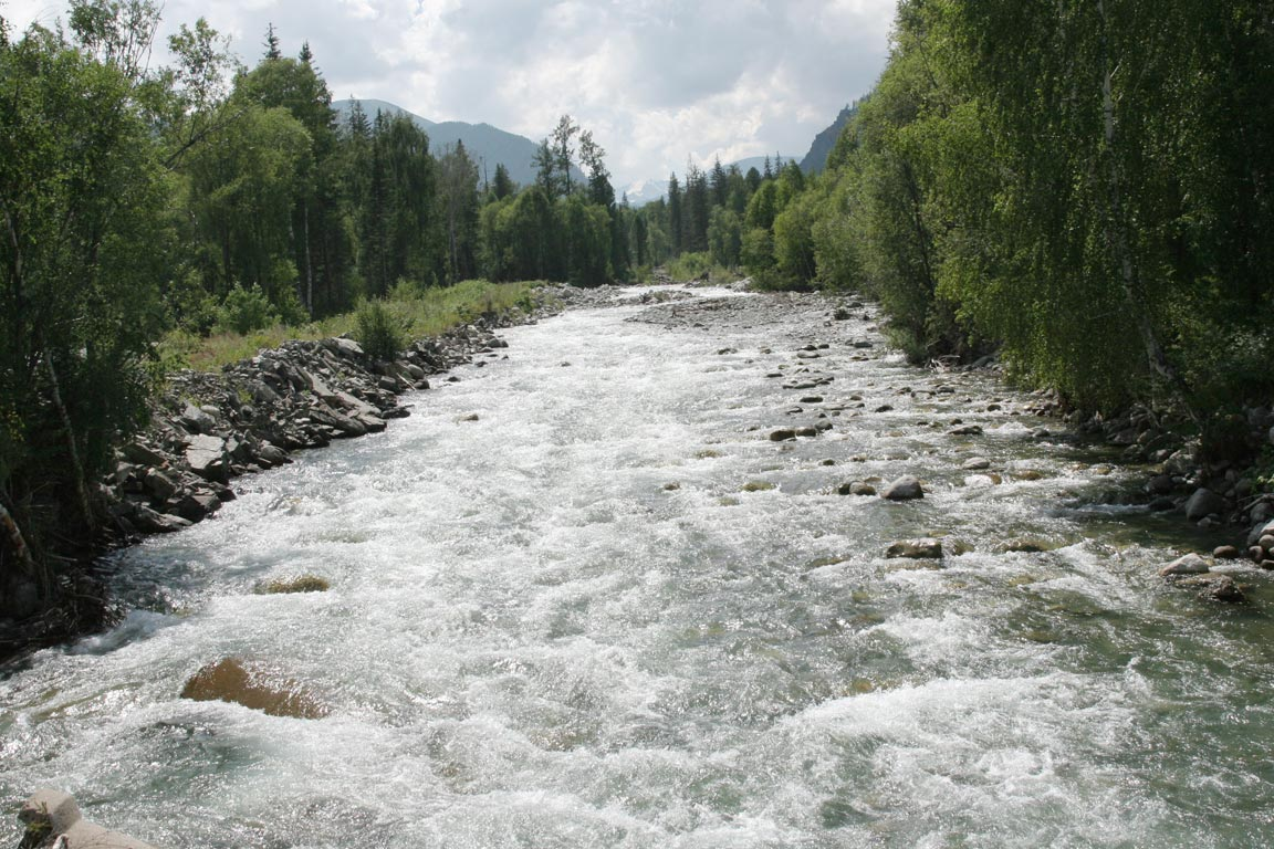 Река Мульта неподалеку от деревни Мульта-Маральник